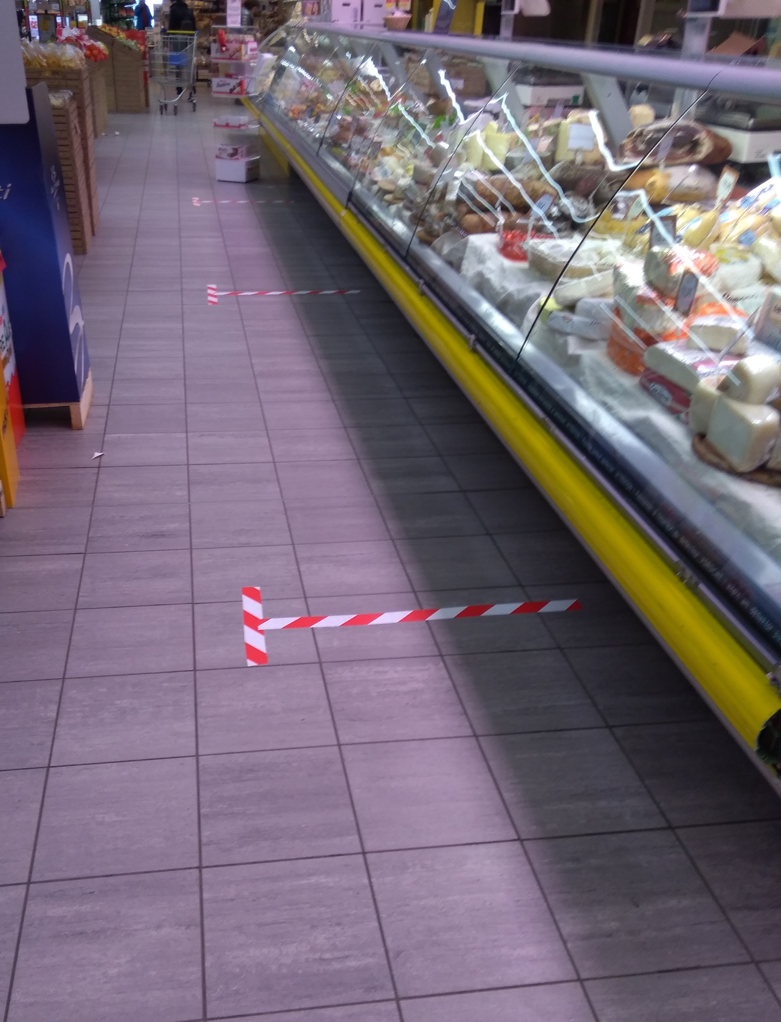 Strisce sul pavimento del supermercato per mantenere la distanza di un metro